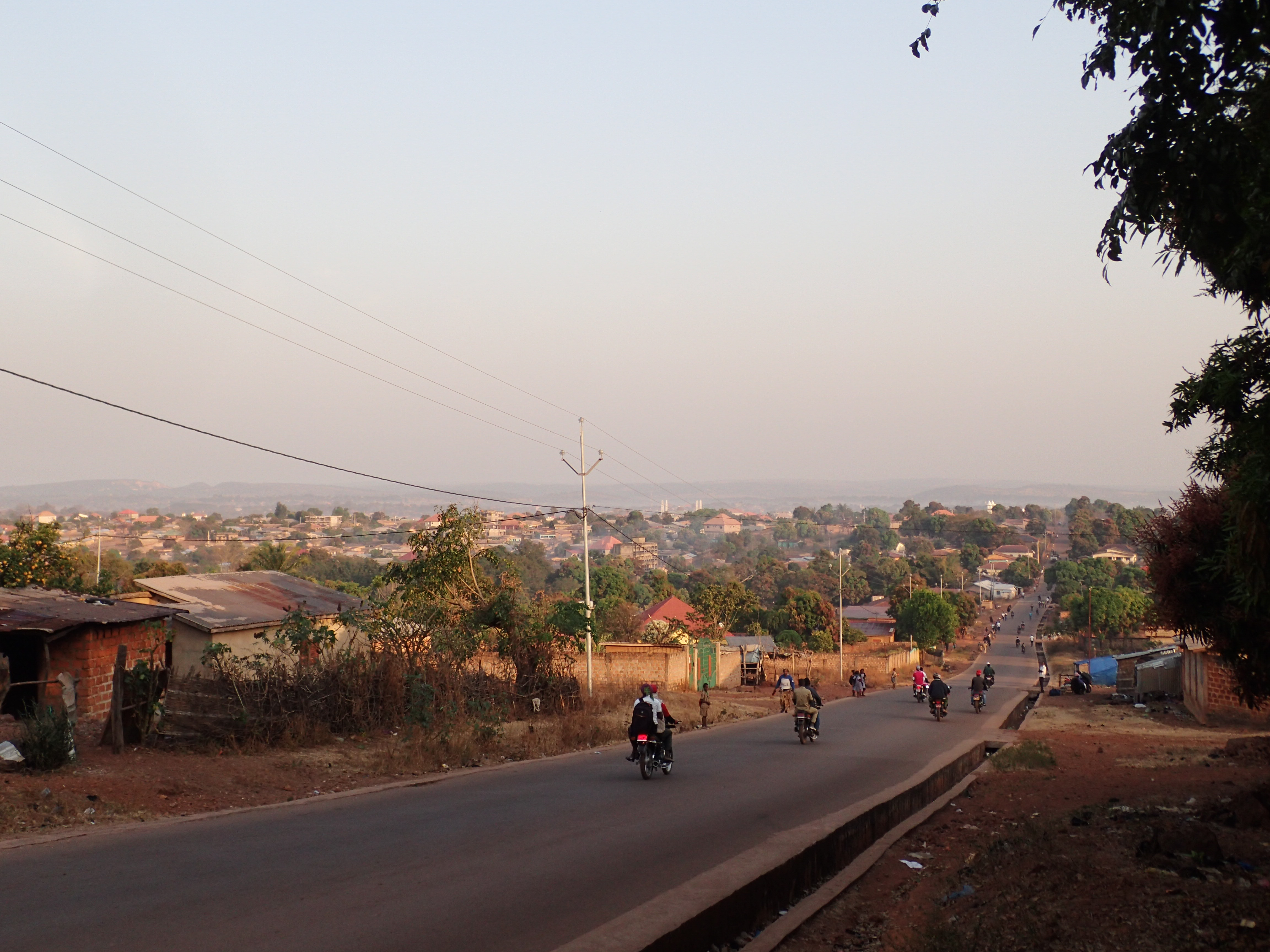 Ville de Labé